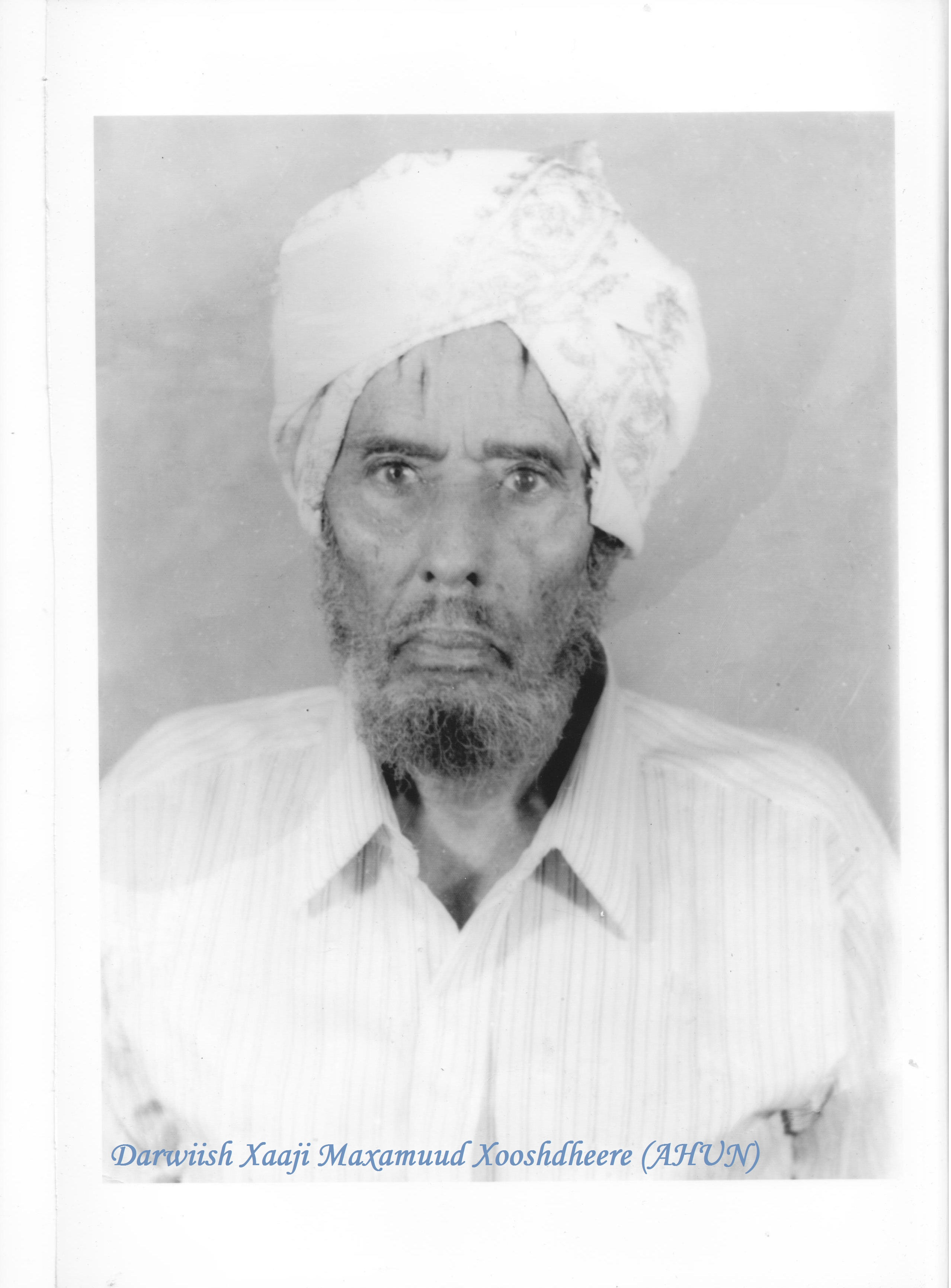 Soomaaliga: Wasiirkii caafimaadka ee wasiiradii dawladii daraawiisheed .